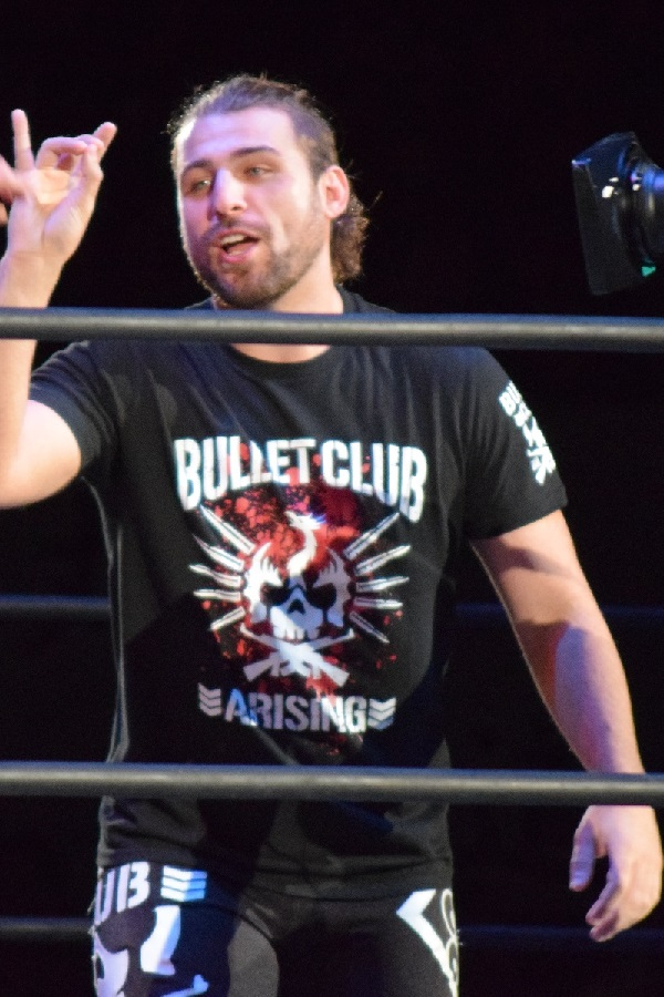 2016年9月25日 ワールド記念ホール「DESTRUCTION in KOBE」 チェーズ・オーエンズ